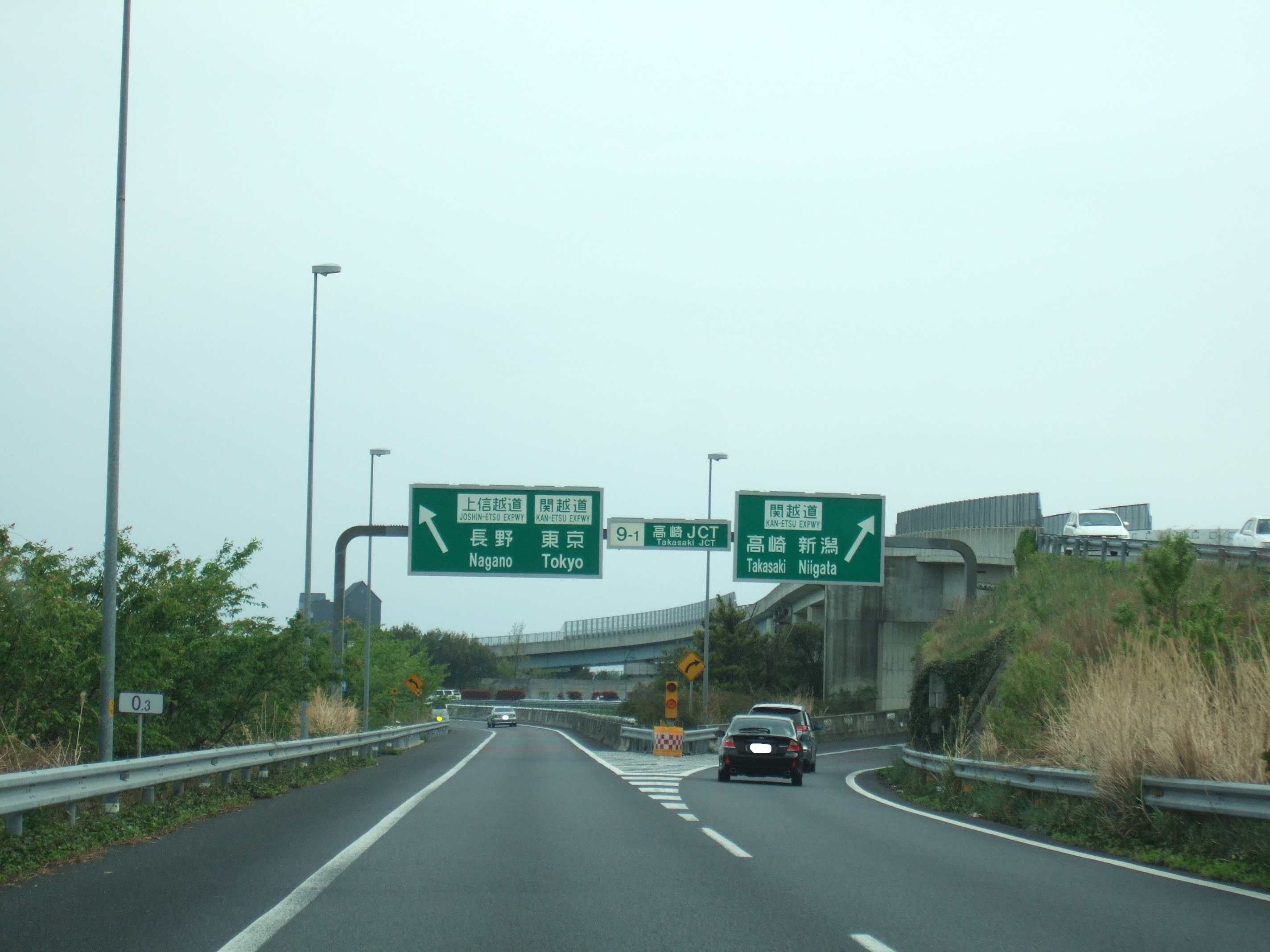 高崎JCT上り分岐